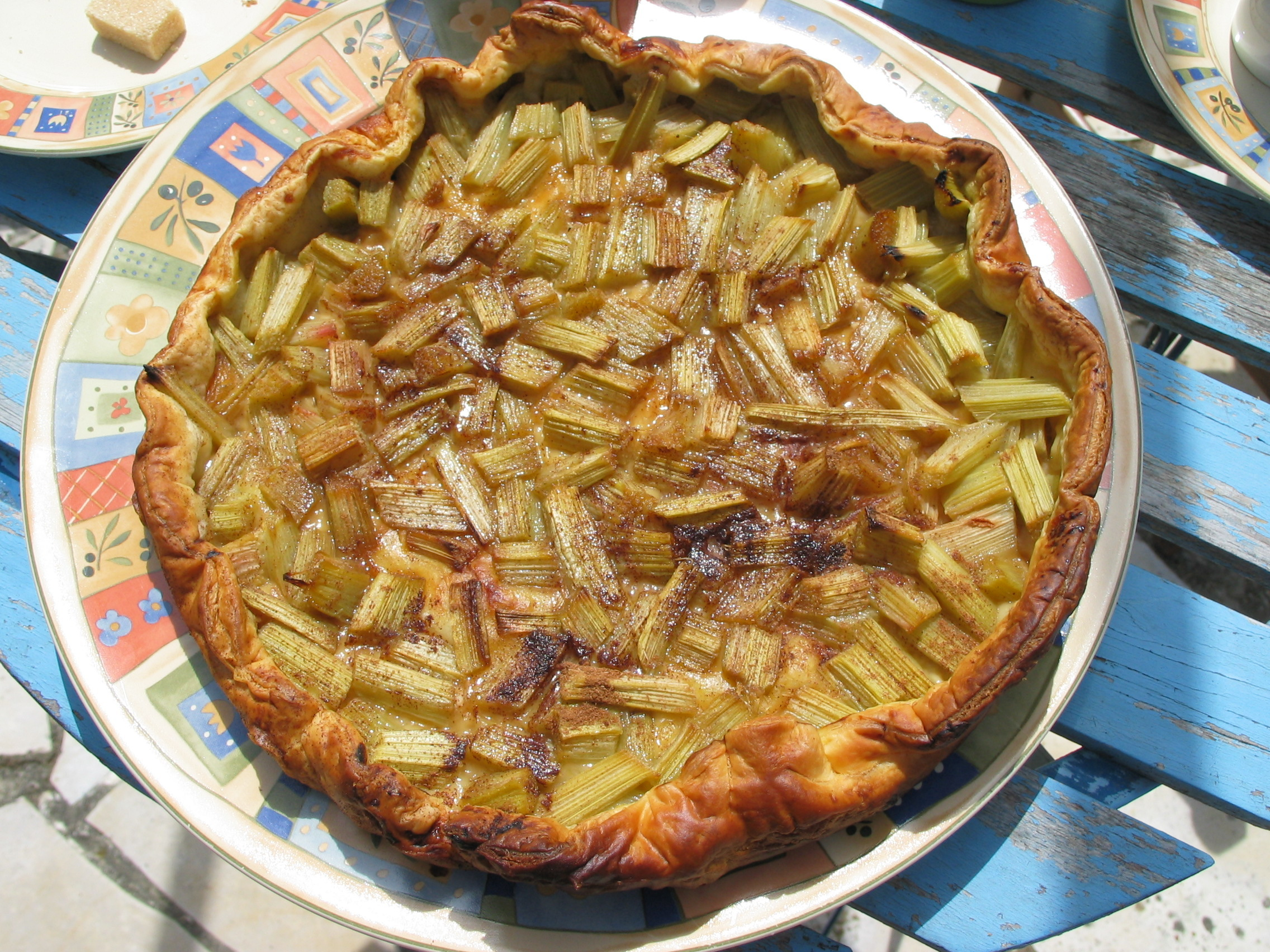 Very simple rhubarb pie